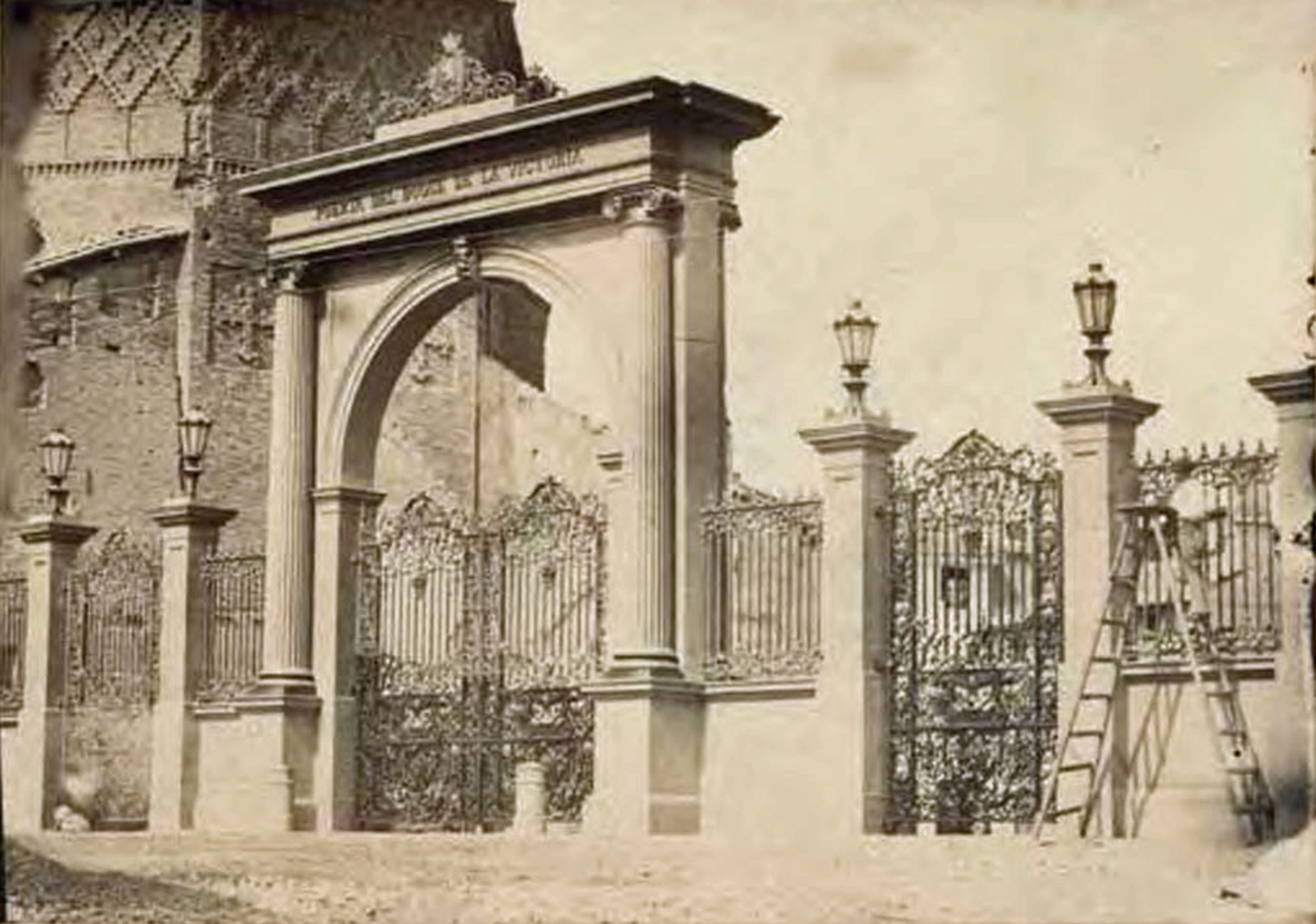 Puerta del Duque de la Victoria en 1861